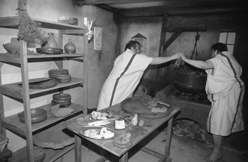 Archäologische Staatssammlung München 1998: Ausstellung römischer Küchen und Tischkultur. Wissenschaftler kochen nach alten römischen Rezepten